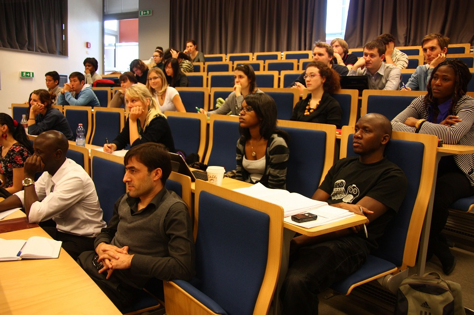 Studenti FTZ v posluchárně